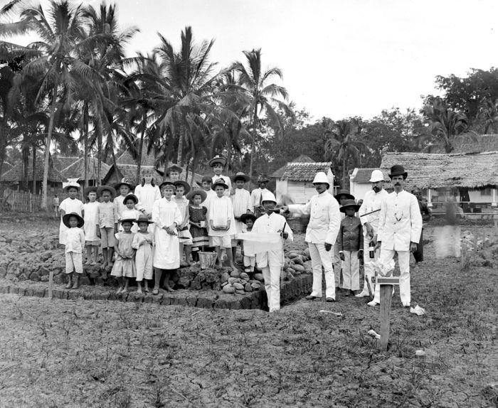 Negatief. De eerste steen wordt gelegd voor de Europese school te Solok. Zowel de (toekomstige) schoolkinderen als degene die de eerste steenelgging doen (in het wit geklede Europeanen) zijn hierbij aanwezig.. Eerste steenlegging van de Europeesche school te Solok (Sumatra)